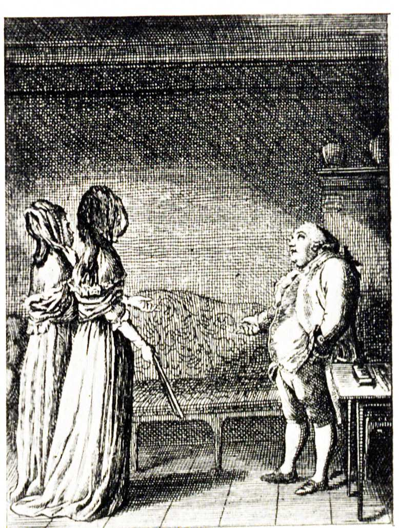 Daniel Chodowiecki Alessandro Cagliostro 1789